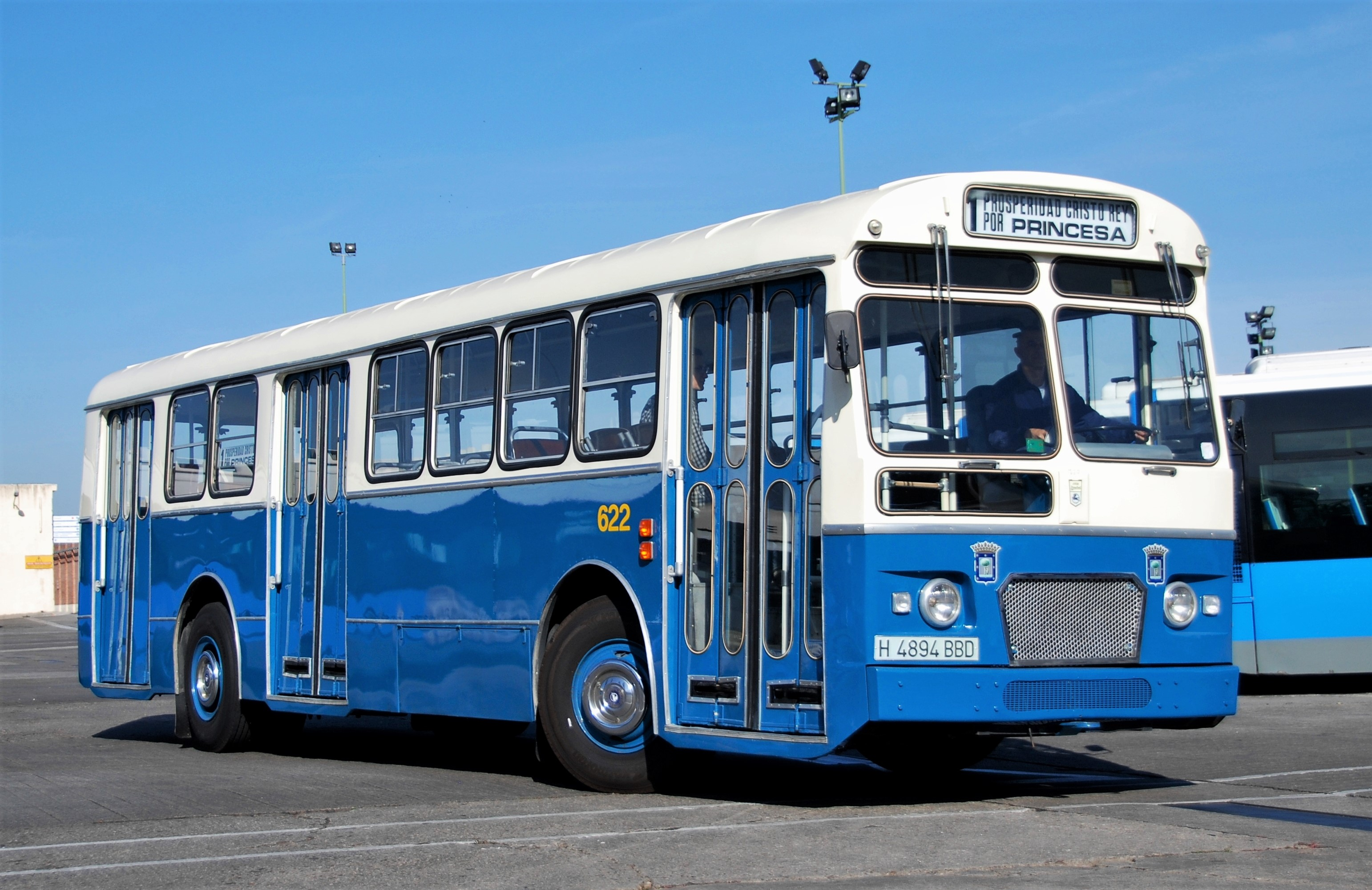 El autobús 622 de la Empresa Municipal de Transportes de Madrid, un Pegaso 6035/5, es el antiguo 134 de la Empresa Cabrero de Valladolid. Dado que Madrid no conservó ninguno de los 415 autobuses de este modelo que tuvo, tuvo que adquirir este para formar parte de su amplio parque de material histórico.